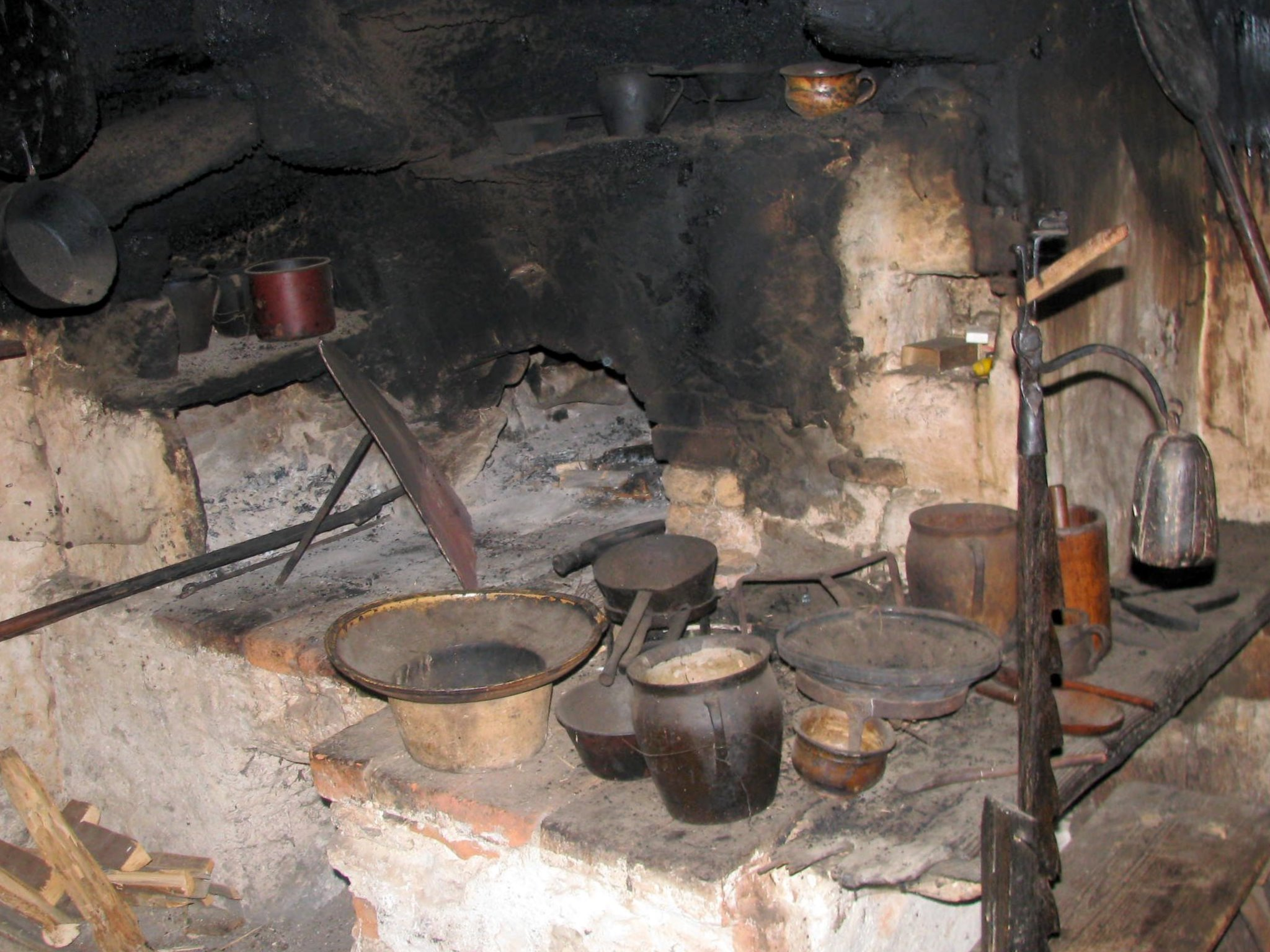 KAvčnikova domačija, Sevodnje, near Velenje, Slovenija